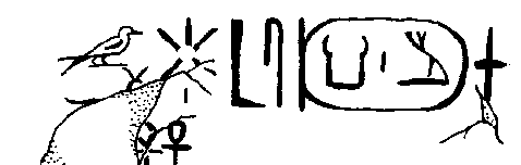 2.Graffito des Baka